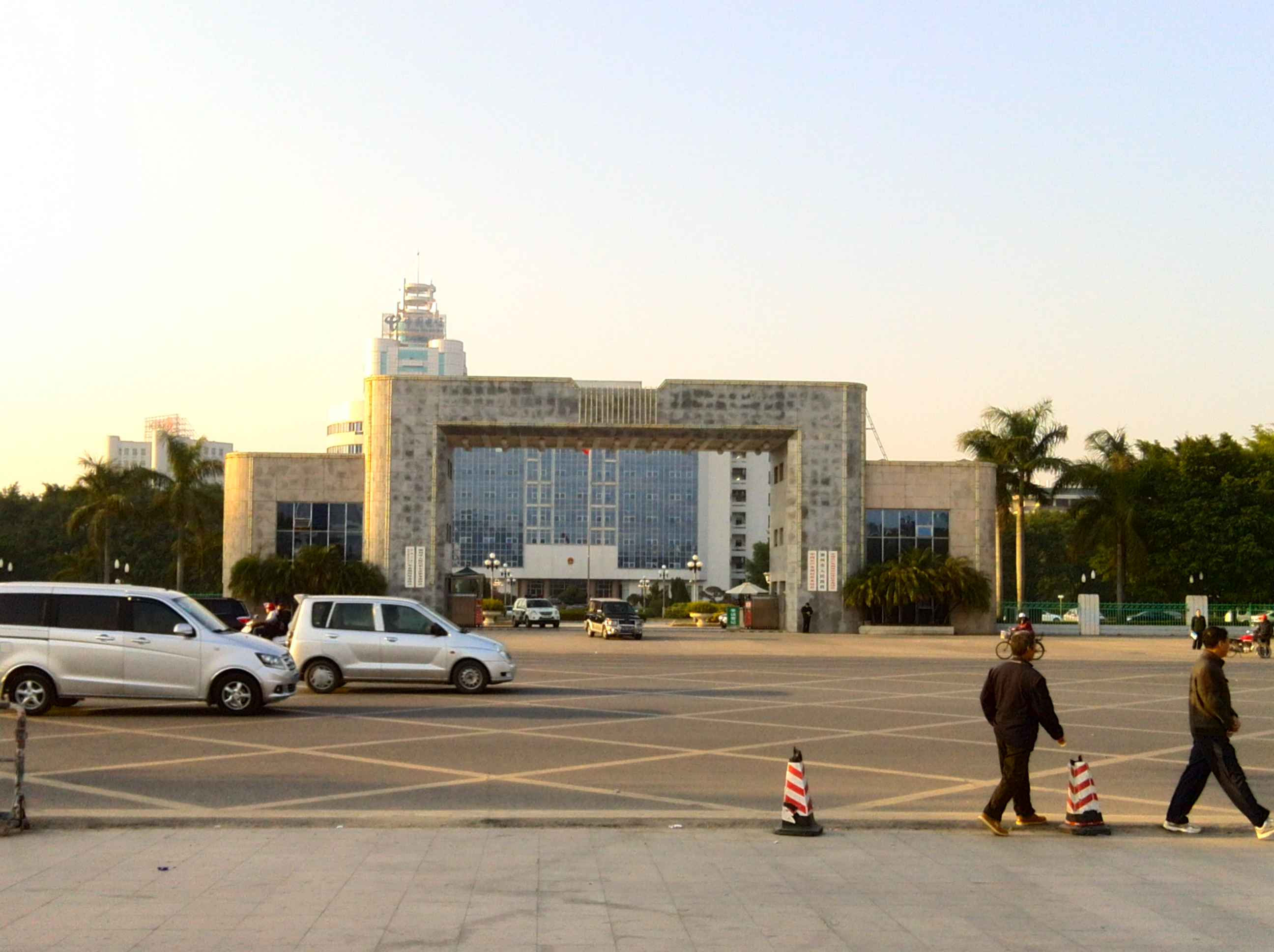 潮州市人民政府大门，位于枫春路。